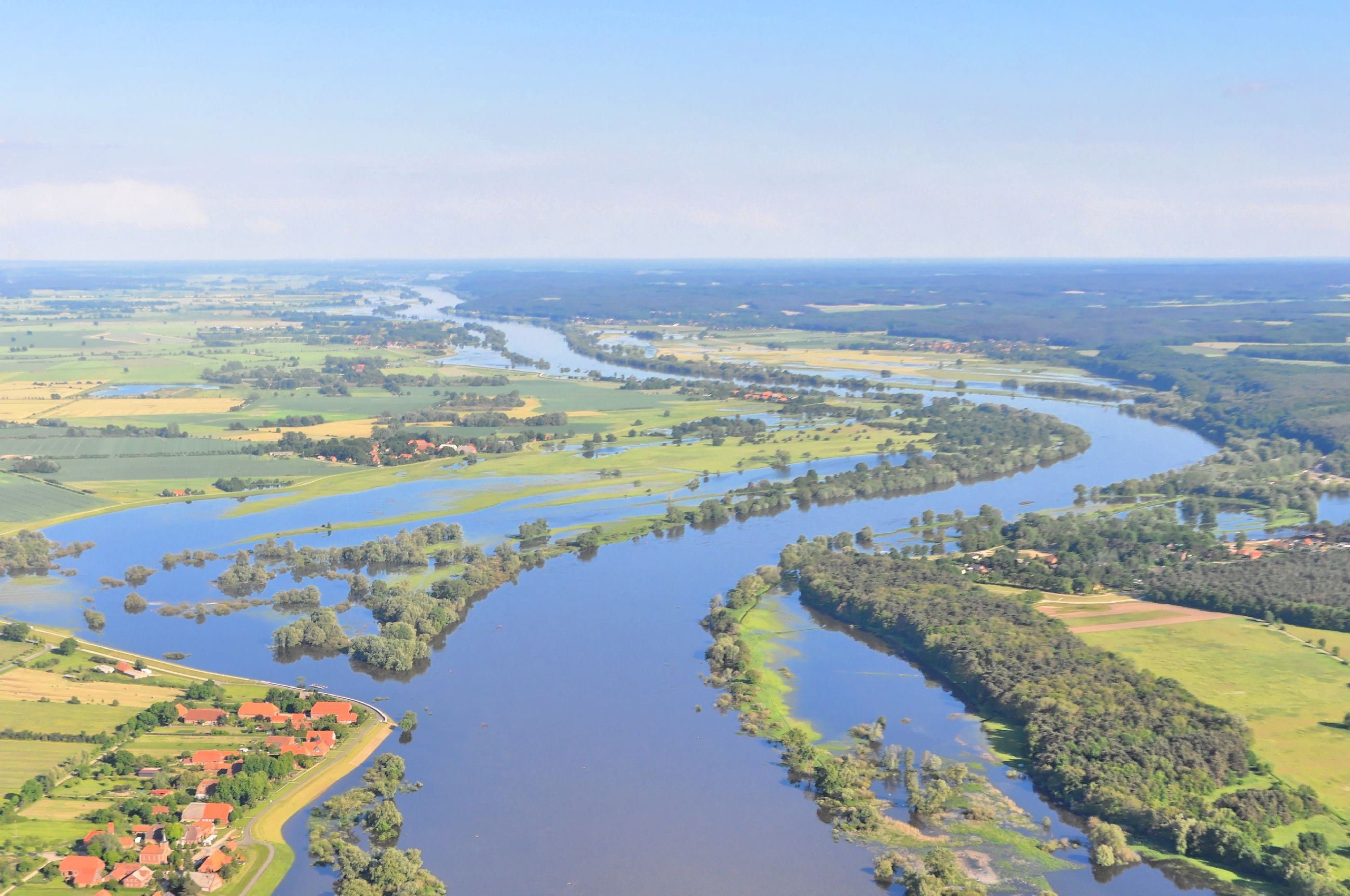 Überführungsflug vom Flugplatz Nordholz-Spieka über Lüneburg, Potsdam zum Flugplatz Schwarzheide-Schipkau